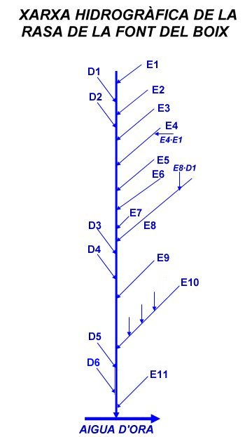 Esquema de la xarxa hidrogràfica de la Rasa de la Font del Boix (tributari de l'Aigua d'Ora)